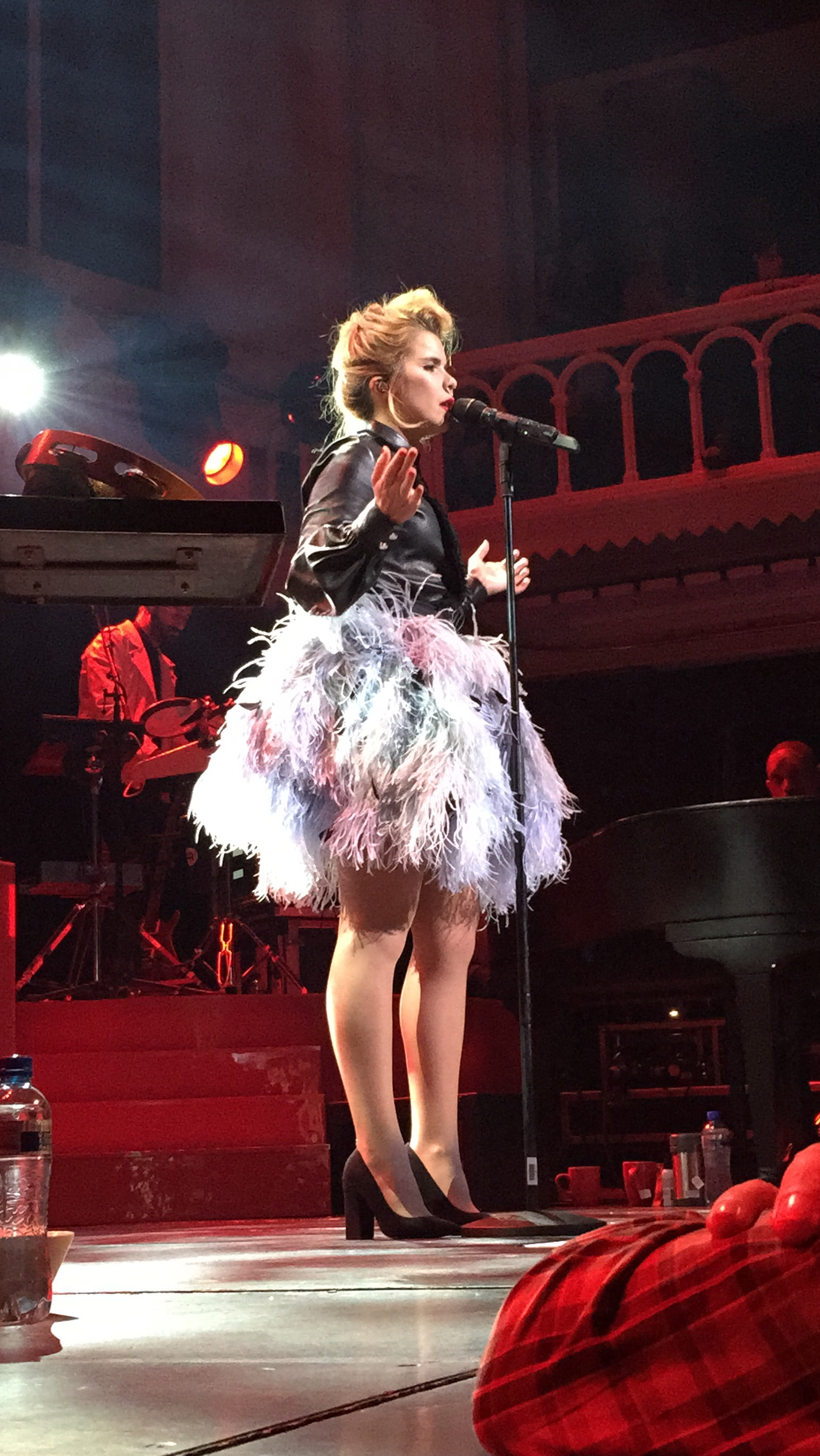 Paloma Faith, 12-02-2015 at Paradiso Amsterdam